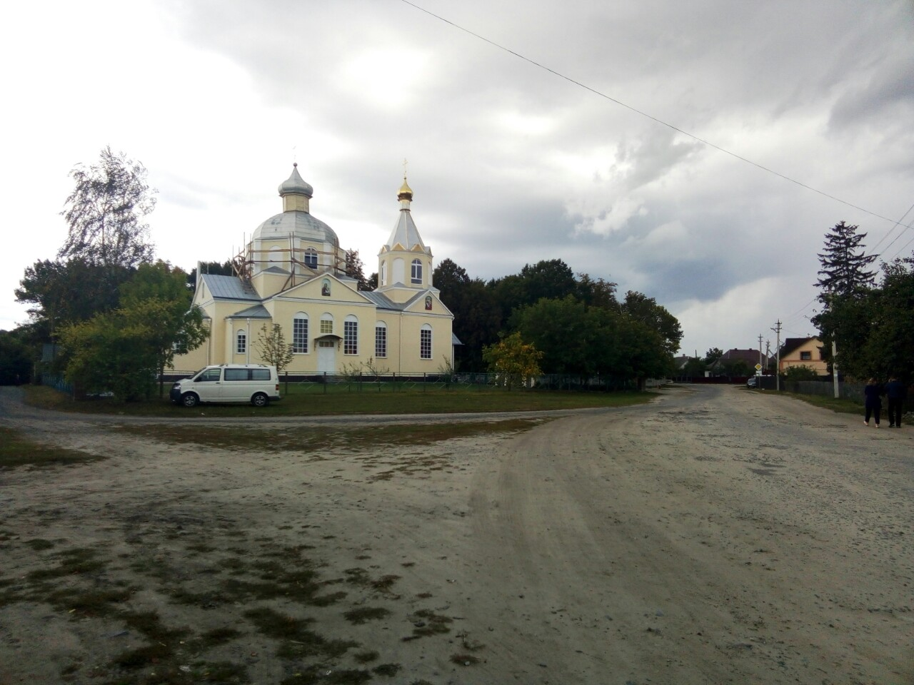 Цекрва УПЦ МП Різдва Божої Матері села Зарудчі настоятелем якої є митрофорний протоїєрей Анатолій Шкара.